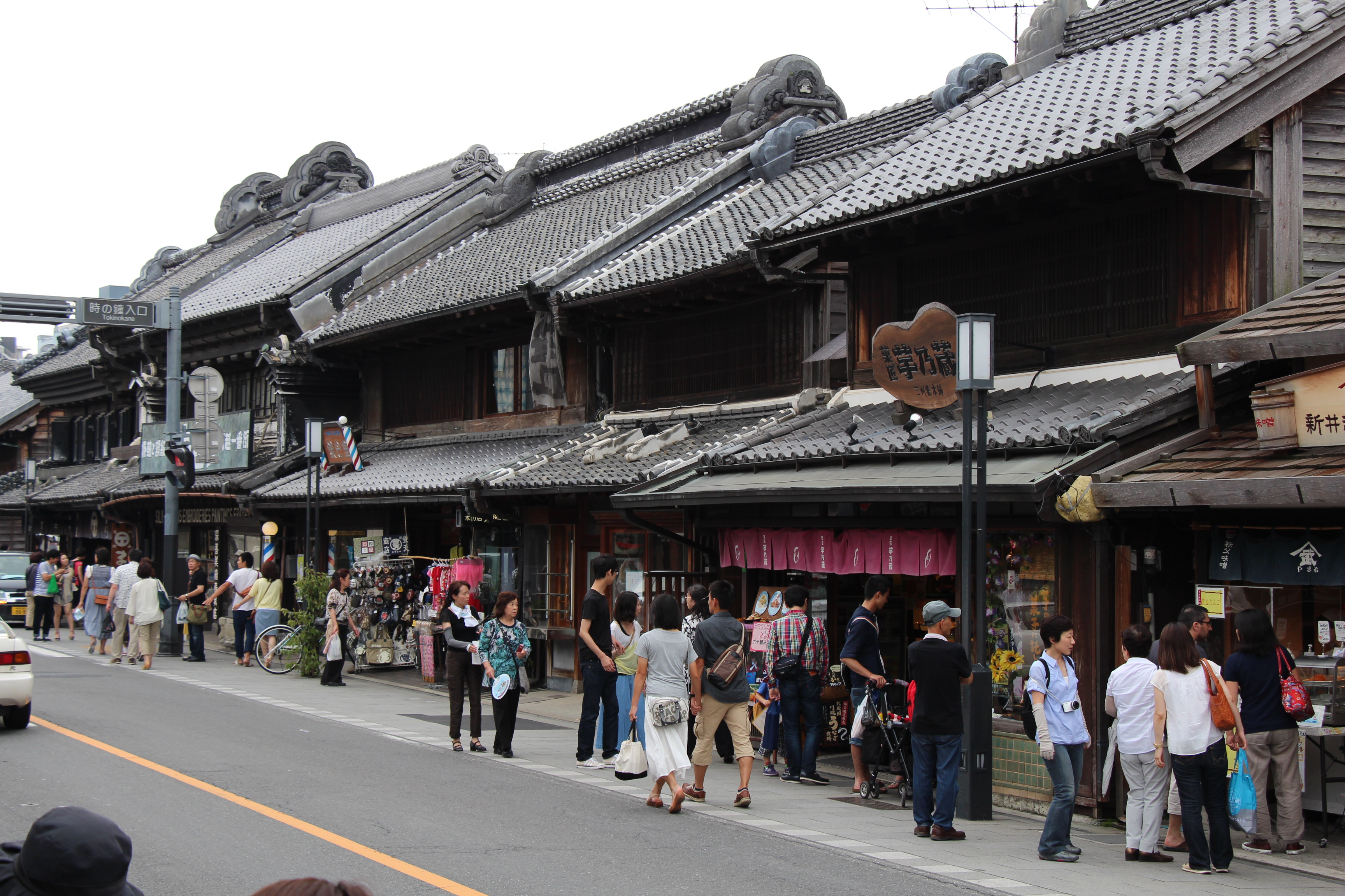 埼玉県川越市 江戸時代の街並み